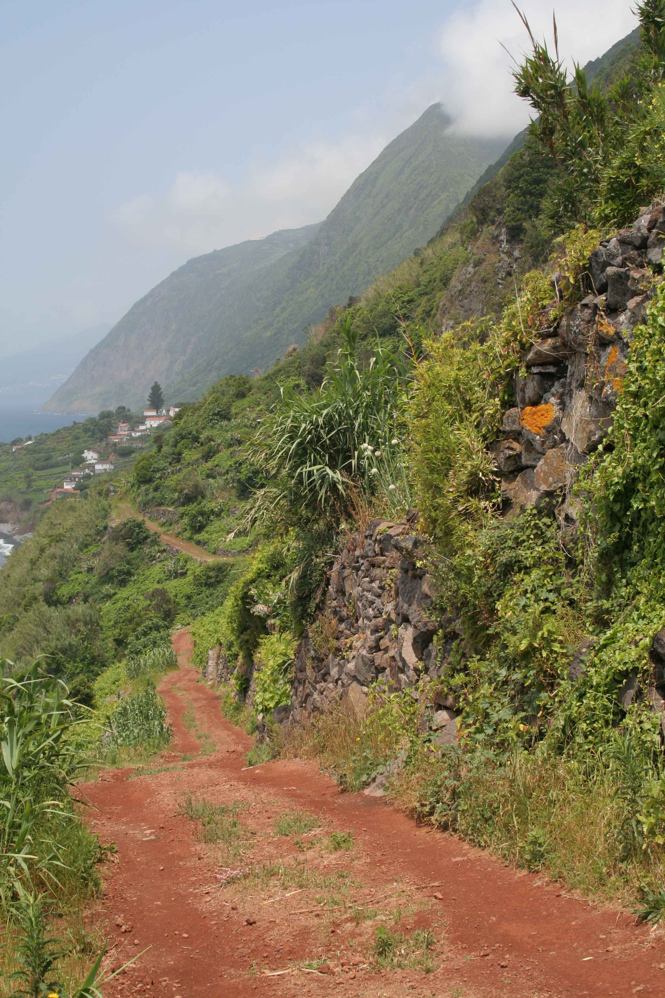 Faja Sao Joao